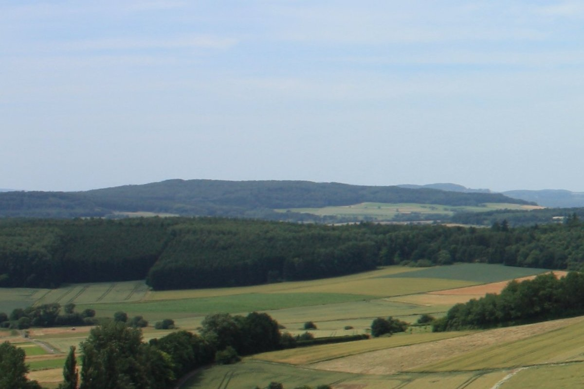 Der Bergrücken „Heidenhäuschen“ im Westerwald, Hessen von Merenberg aus gesehen